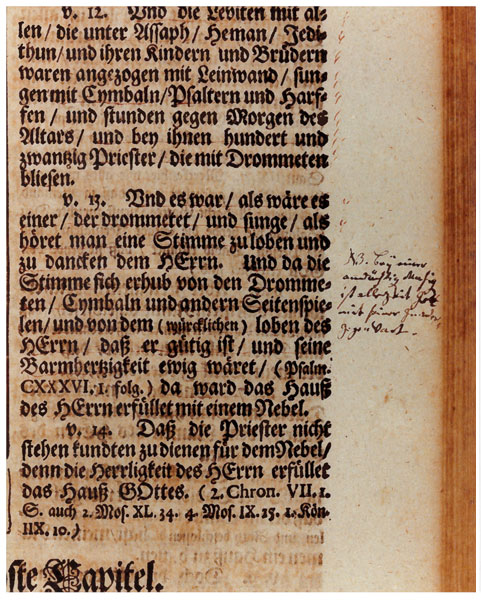 2 Chronik 5,13 (Übersetzung Martin Luther) v.13. Und es war/ als wäre es einer/ der drommetet/ und sunge/ als höret man eine Stimme zu loben und/ zu dancken dem HErrn. Und da die Stimme sich erhub von den Dromme= ten/ Cymbaln und andern Seitenspie= len/ und von dem (würcklichen) loben des HErrn/ daß er gütig ist/ und seine Barmhertzigkeit ewig wäret/ (Psalm CXXXVI, I. folg.) da ward das Hauß des HErrn erfüllet mit einem Nebel. mit Johann Sebastian Bachs eigenhändiger Randbemerkung N[ota] B[ene] Bey einer andächtigen Musiq ist allezeit Gott mit seiner Gnaden= Gegenwart Aus Johann Sebastian Bachs Exemplar der Calov-Bibel in Besitz des Concordia Seminary in St. Louis, Missouri